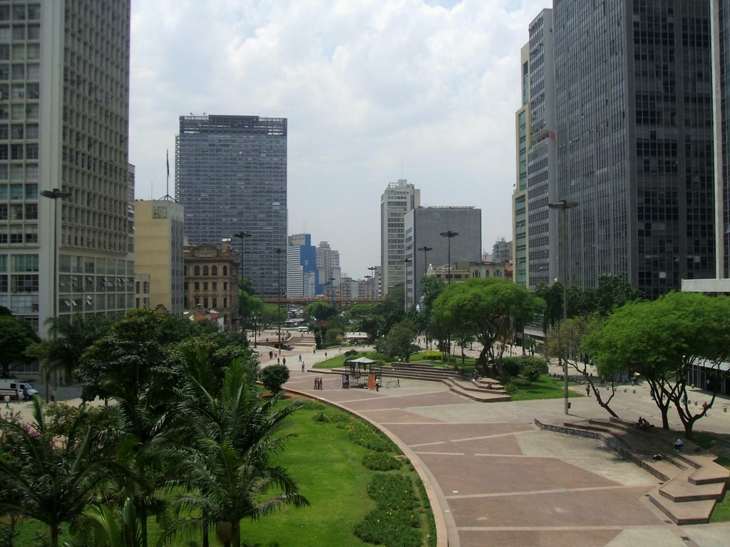 Vale do Anhangabaú, no centro de São Paulo, Brasil